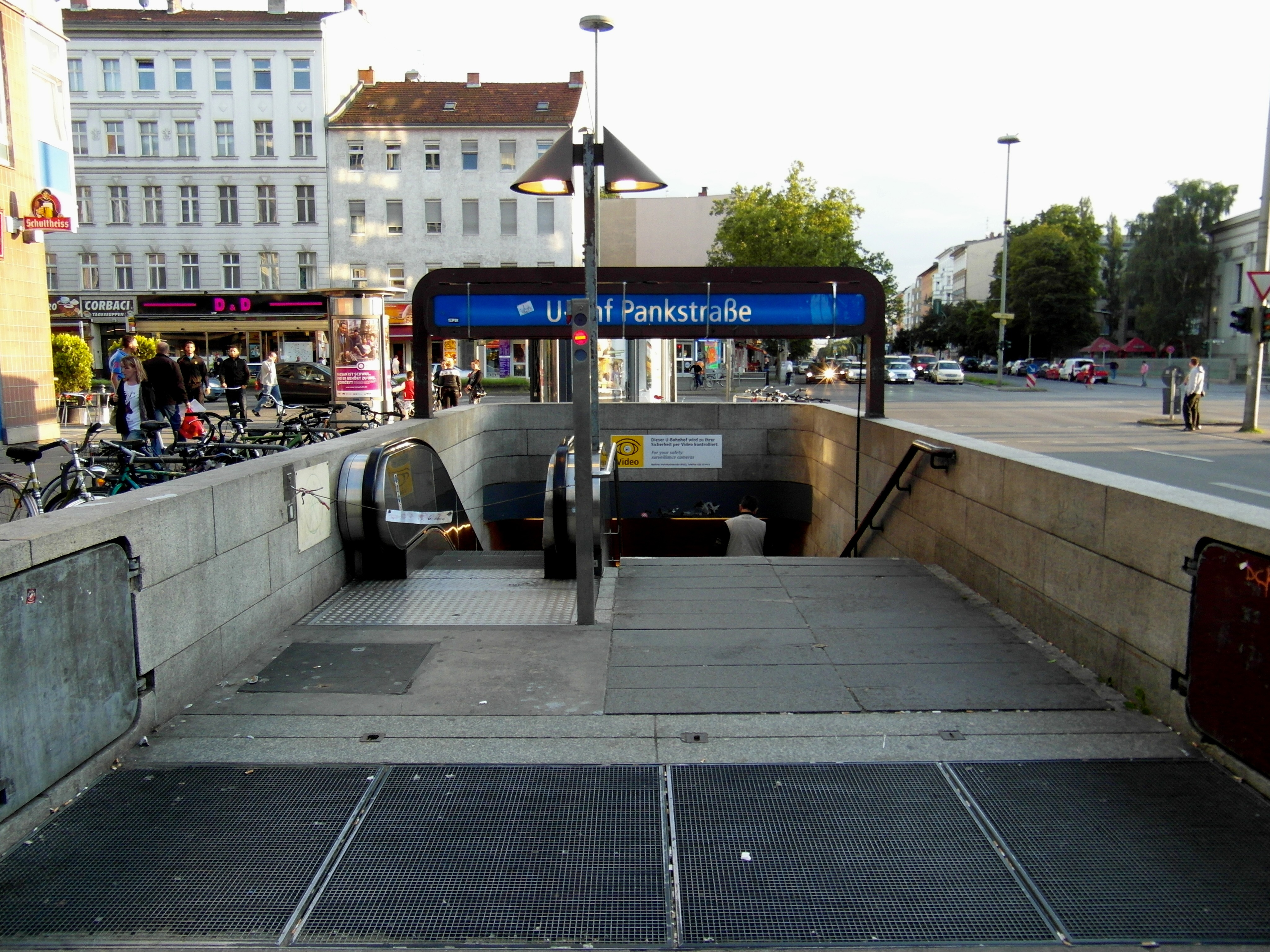 Zugänge